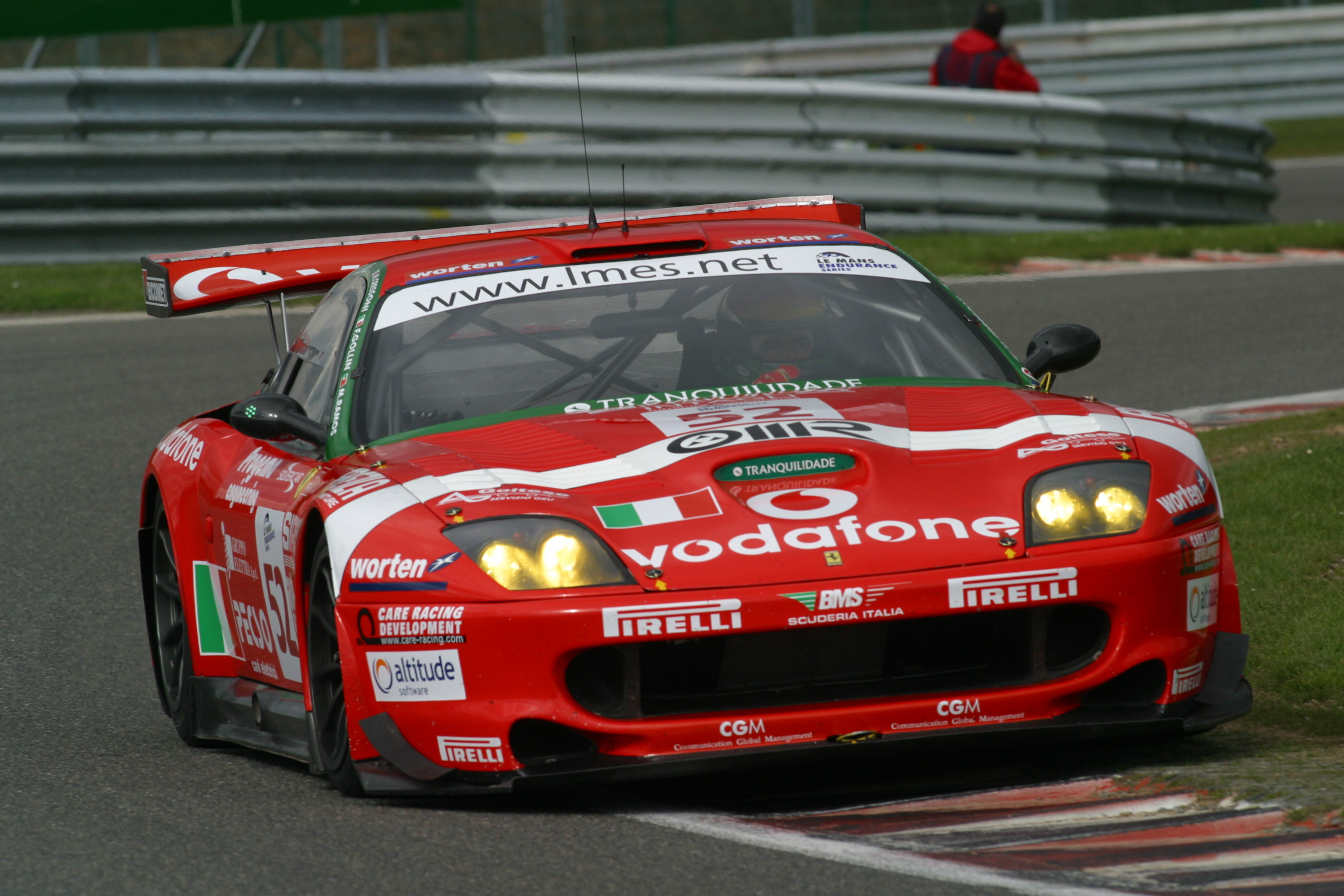 Matteo Cressoni al volante della Ferrari 550 del team BMS Scuderia Italia (LMES)